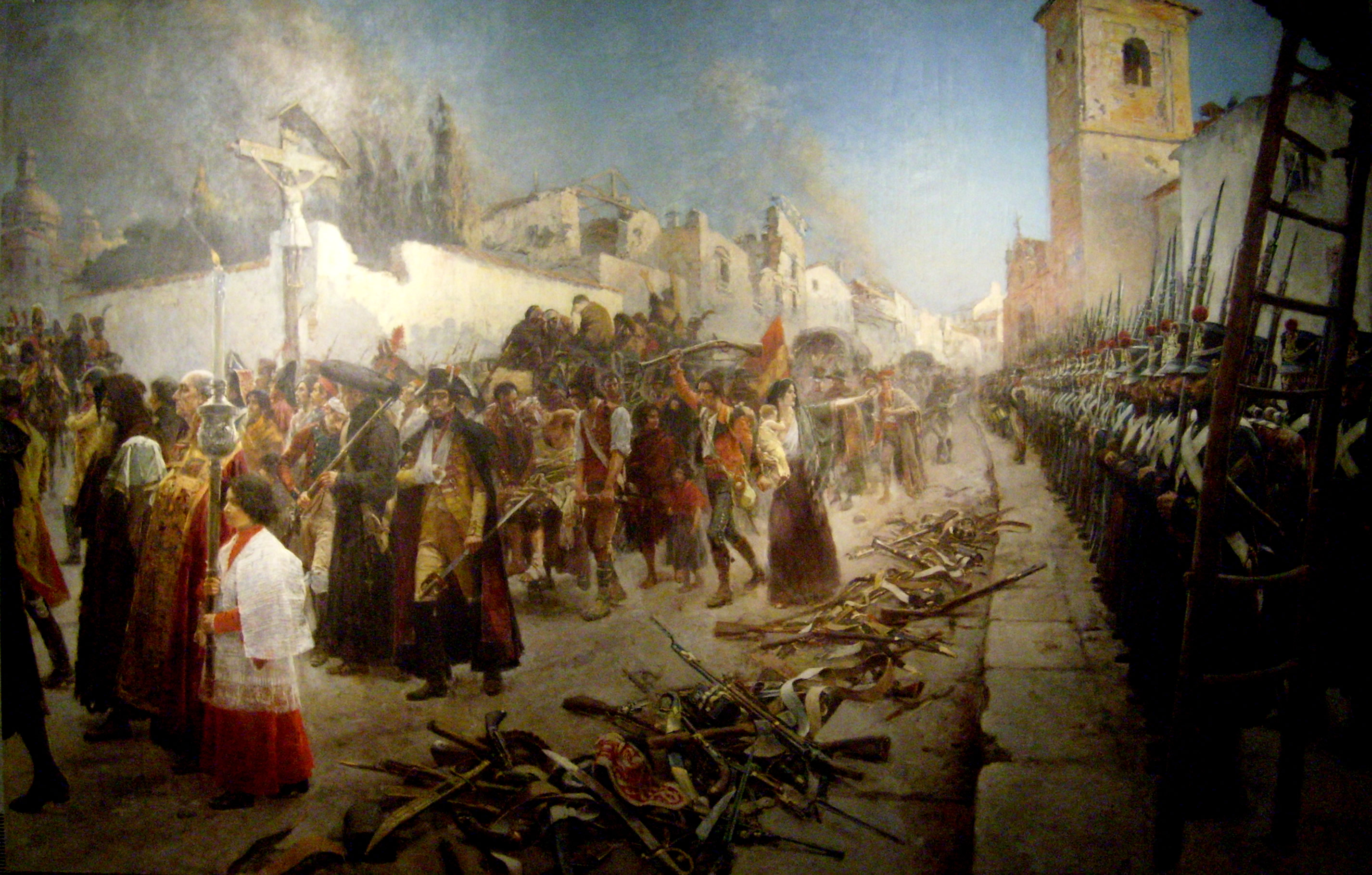 Maurice Orange, Les Défenseurs de Saragosse Huile sur toile, Musée Thomas-Henry, Cherbourg-Octeville, 2009